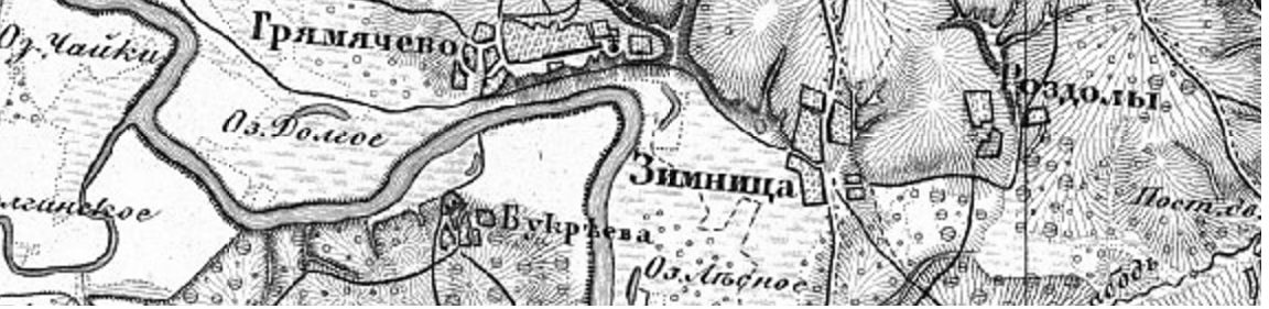 Карта Шуберта